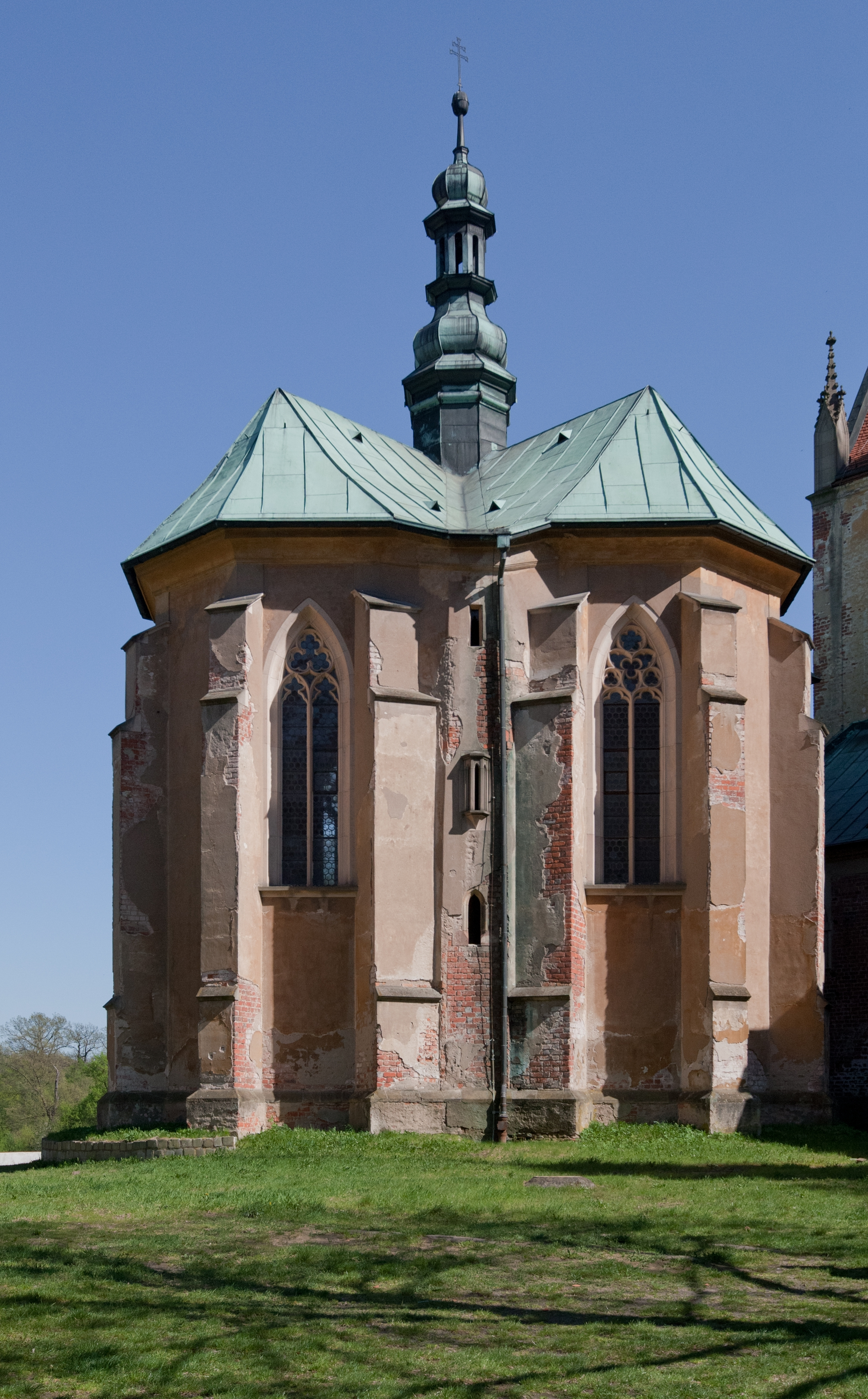 Opactwo cystersów w Lubiążu – kaplica książęca